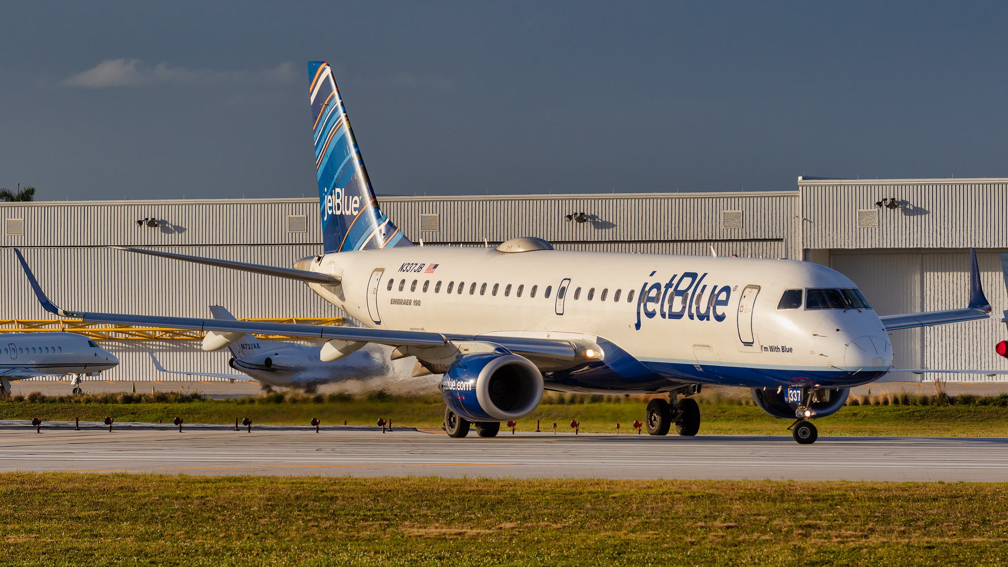 02122019_jetBlue_E190_N337JB_KFLL_NASEDIT